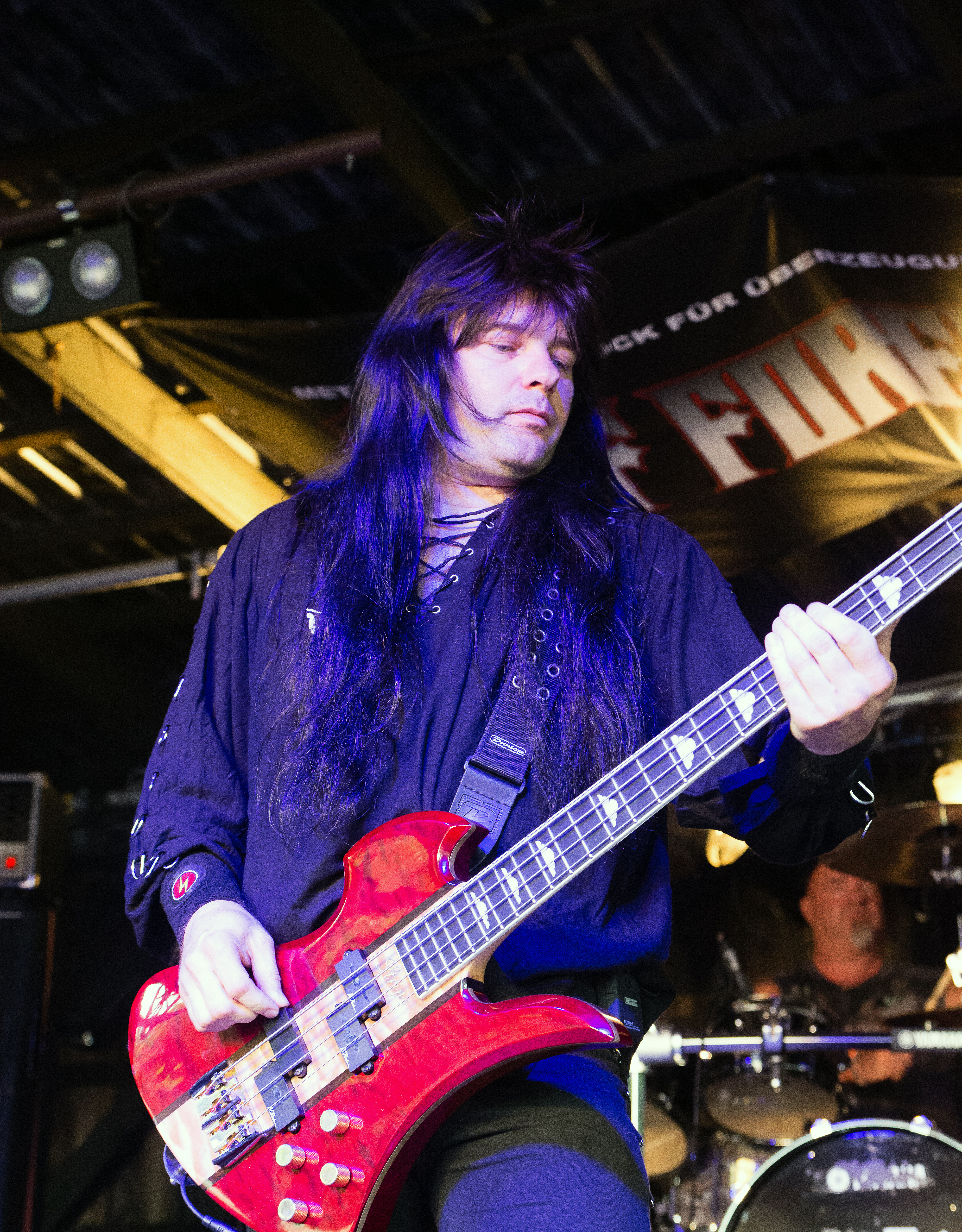 Ostrogoth beim Headbangers Open Air 2016